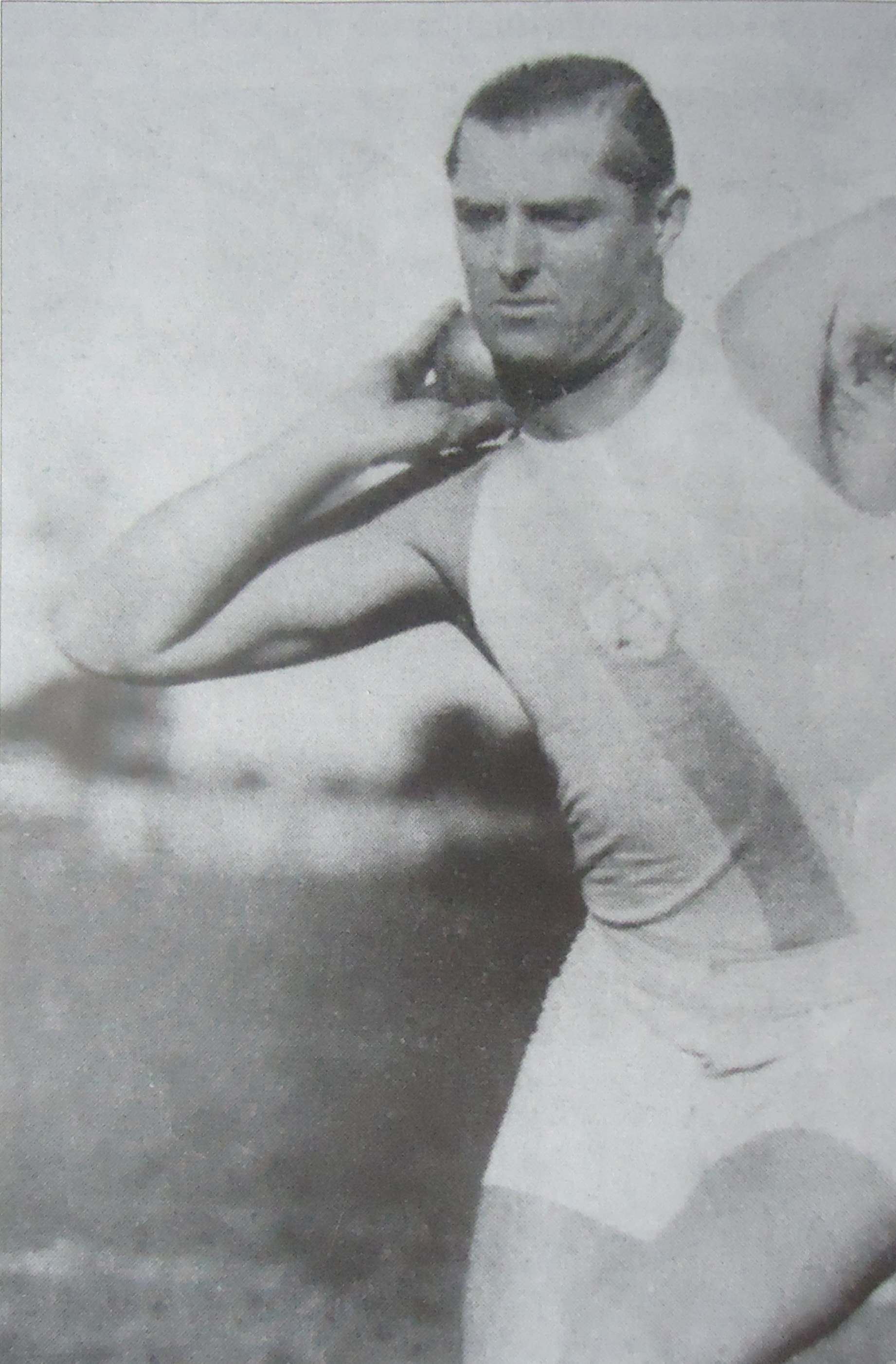 Federico Kleger, atleta argentino nacido en Sudáfrica.